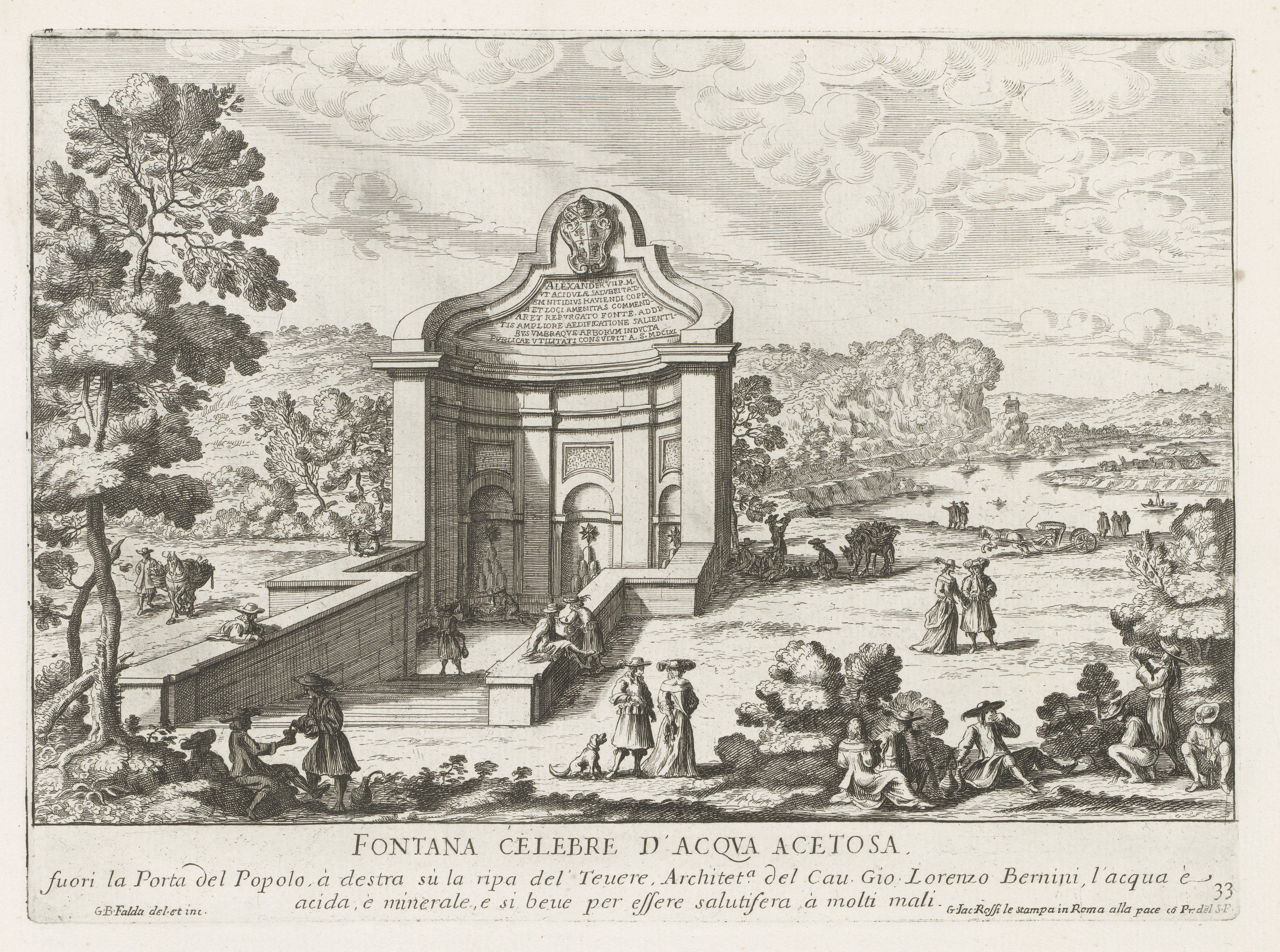 IdentificatieTitel(s): Fontana dell'Acqua Acetosa te RomeFontana celebre d'Acqua Acetosa (...) (titel op object)Fontane di Roma (serietitel)Fonteinen van Rome (serietitel)Objecttype: albumblad prent Serienummer: 33/33Objectnummer: BI-1893-A39-33Catalogusreferentie: The Illustrated Bartsch 37-2(2)The Illustrated Bartsch 35Bartsch 35Omschrijving: Landschap met de Fontana dell'Acqua Acetosa te Rome. Genummerd rechtsonder: 33. De prent maakt deel uit van een album.VervaardigingVervaardiger: prentmaker: Giovanni Battista Falda (vermeld op object)naar eigen ontwerp van: Giovanni Battista Falda (vermeld op object)uitgever: Giovanni Giacomo de'Rossi (vermeld op object)verlener van privilege: Innocentius XII (vermeld op object)Plaats vervaardiging: prentmaker: Italiënaar eigen ontwerp van: Italiëuitgever: Romeverlener van privilege: VaticaanstadDatering: 1653 - 1691Fysieke kenmerken: ets met plaattoonMateriaal: papier Techniek: etsen / plaattoonAfmetingen: plaatrand: h 213 mm × b 289 mmOnderwerpWat: ornamental fountainWaar: Fontana dell'Acqua AcetosaRomeVerwerving en rechtenVerwerving: aankoop feb-1893Copyright: Publiek domein